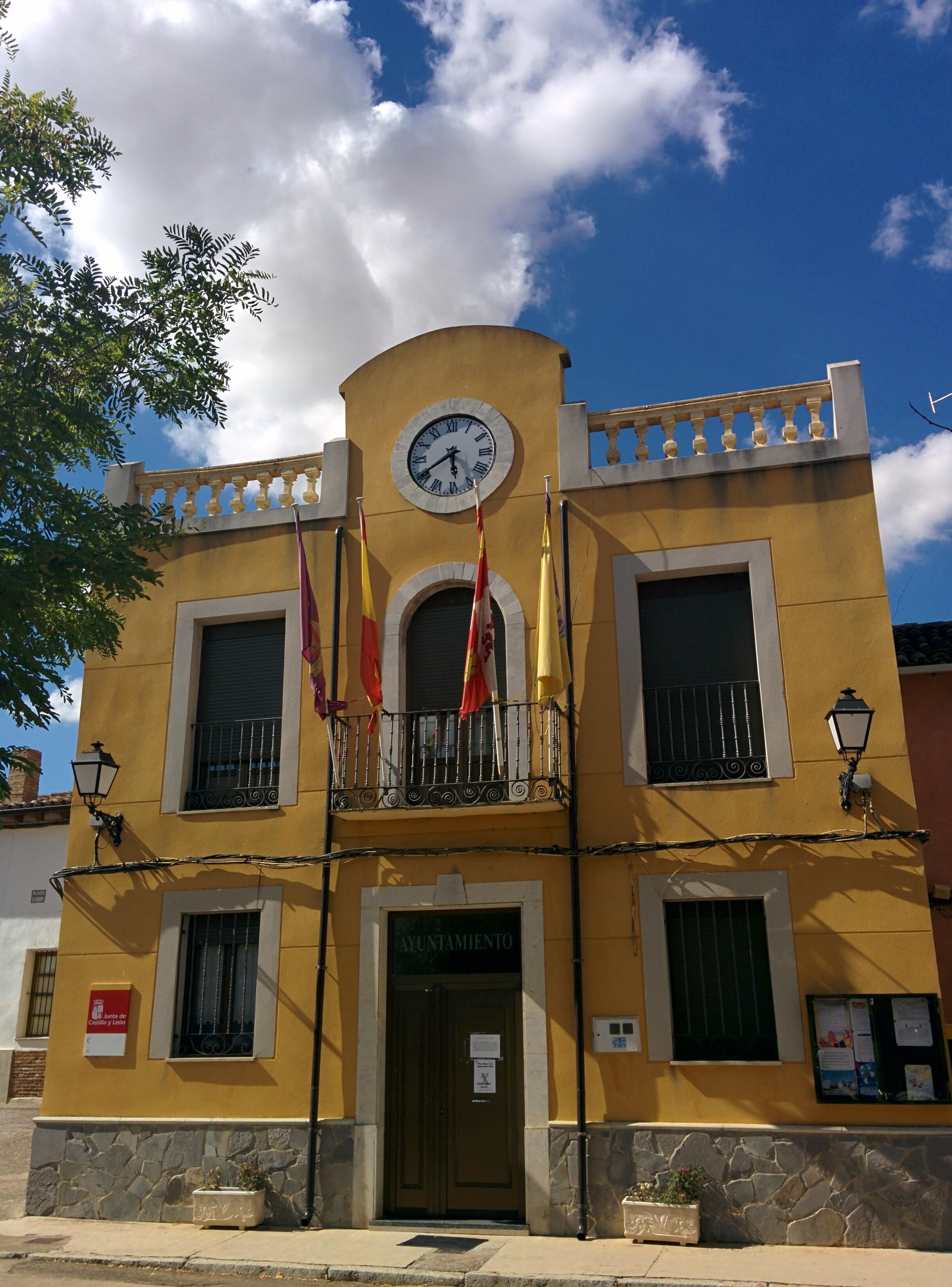 Casa consistorial de Boadilla de Rioseco (Palencia, España).